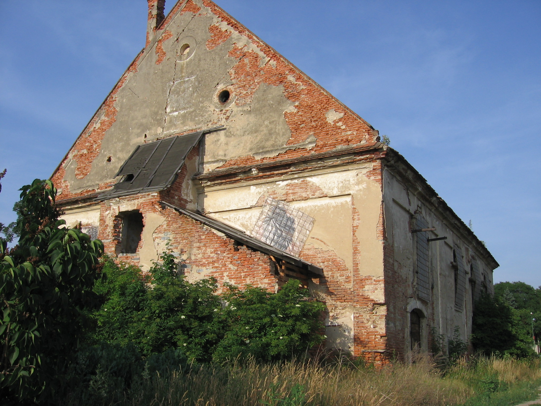 Synagóga v Stupave – Kategória:Obrázky budov